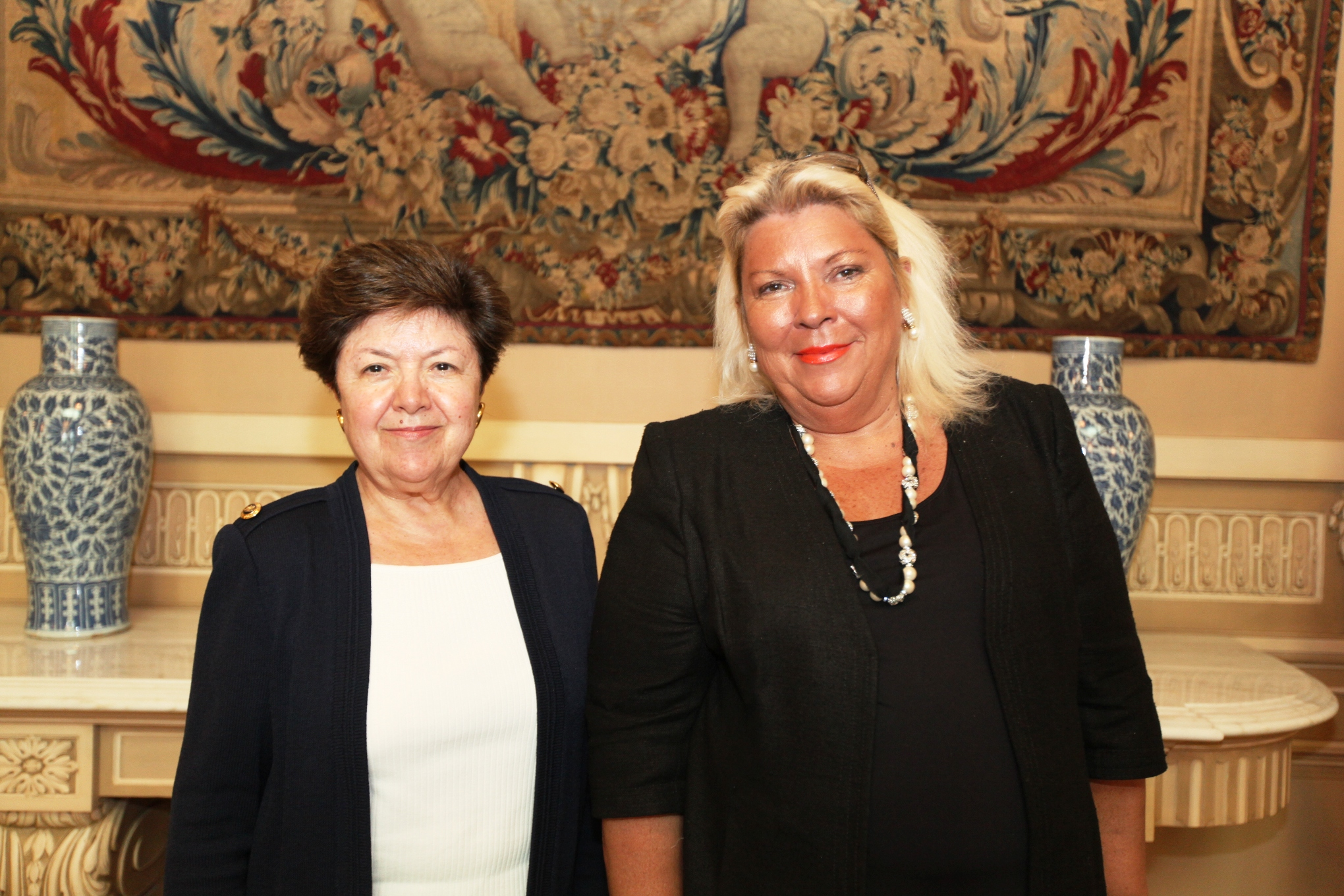 La Embajadora y la Diputada Nacional Elisa Carrió. Abril 2010